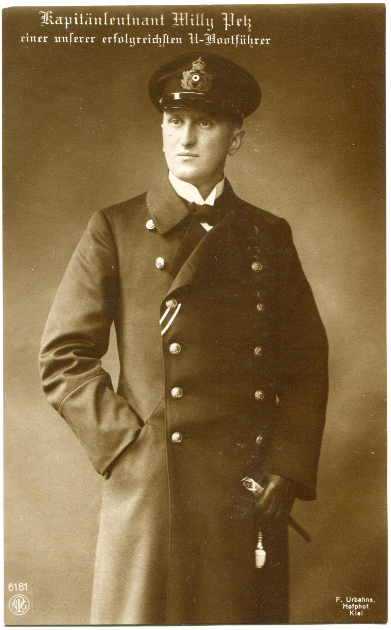 Почтовая открытка. Капитан-лейтенант Петц, фотография